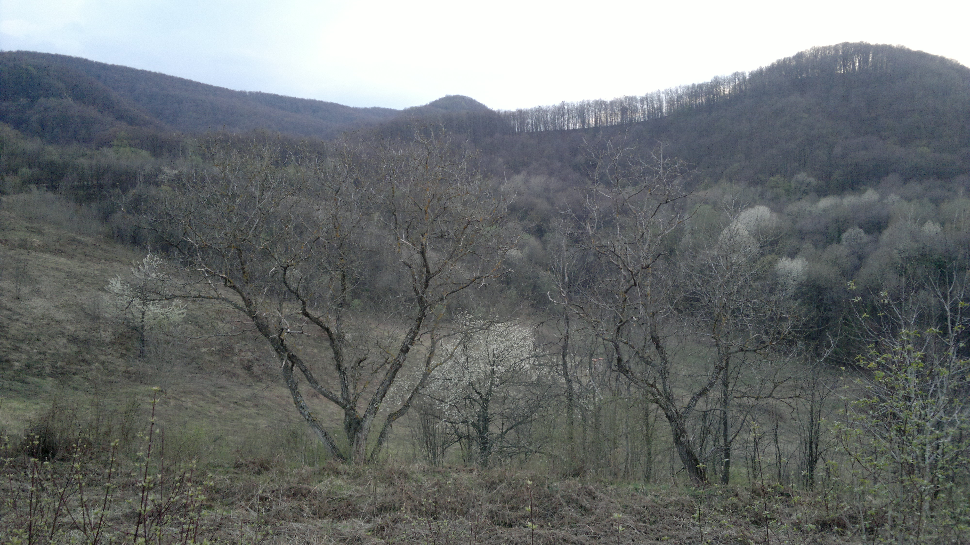 Gornja Pištana, Croatia